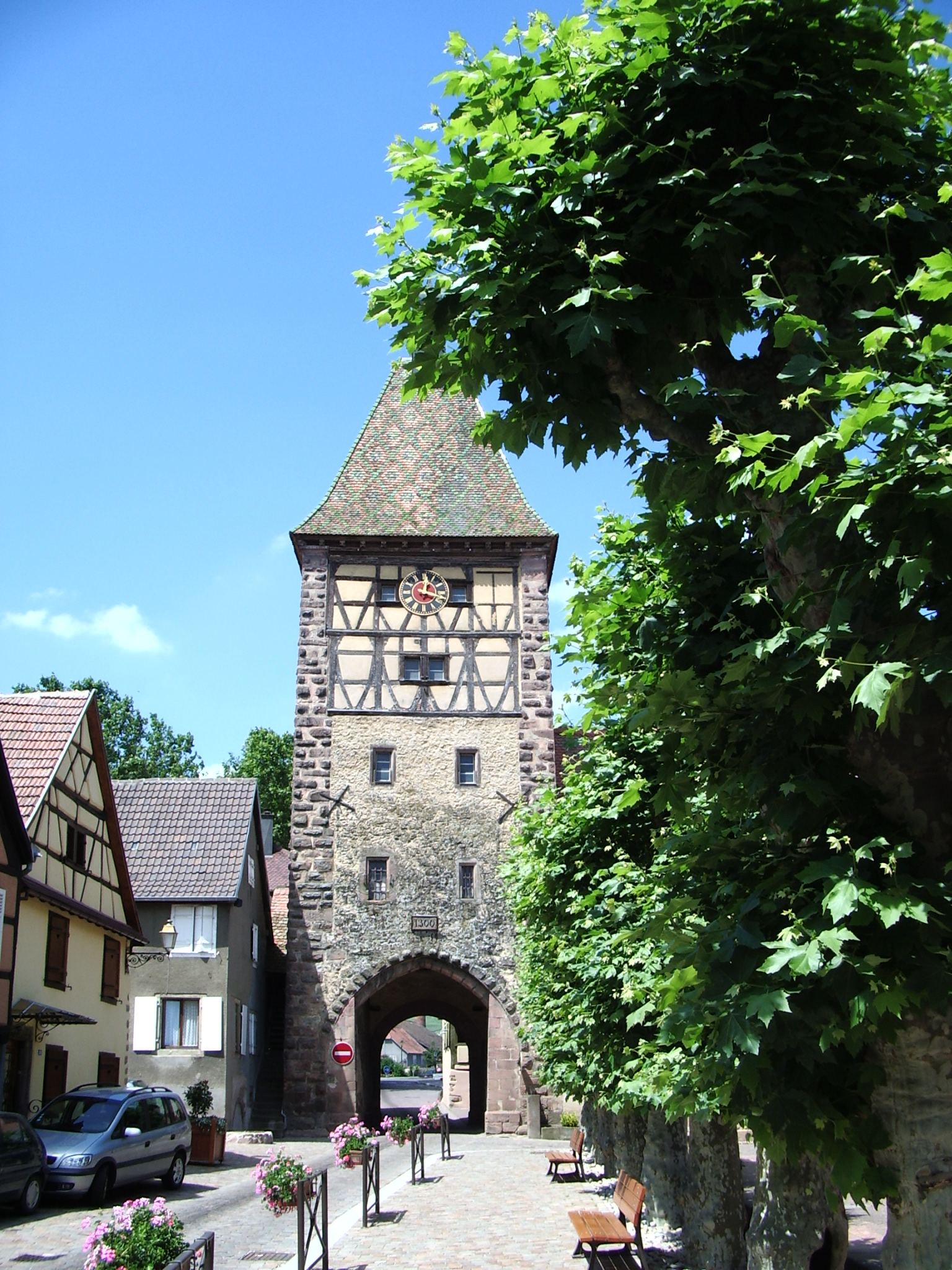 Bergheim, een gemeente in het departement Haut-Rhin in de regio Elzas in Frankrijk. zelf gemaakte foto